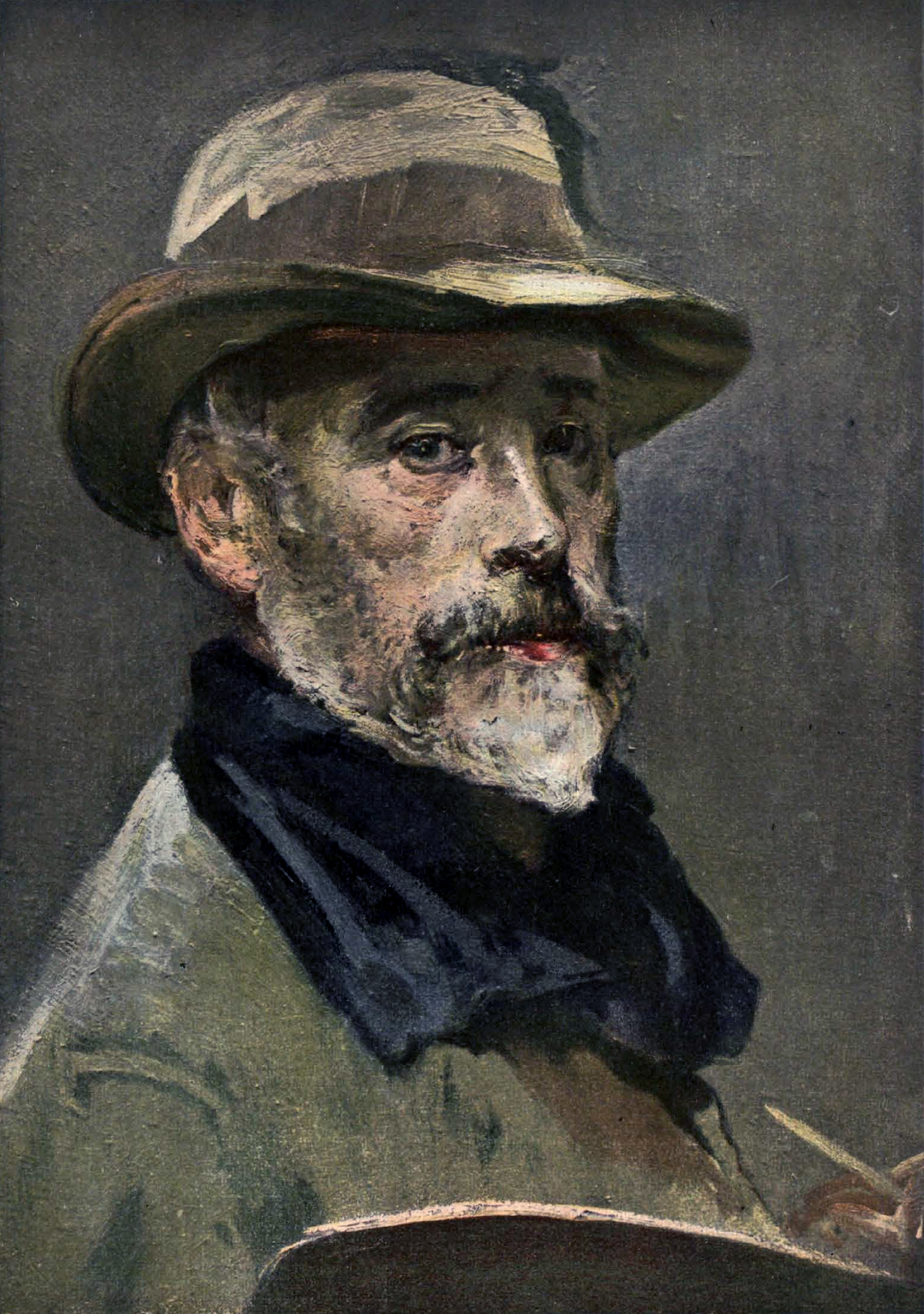 Retrato del eminente pintor Ignacio Pinazo; pintado por él mismo.